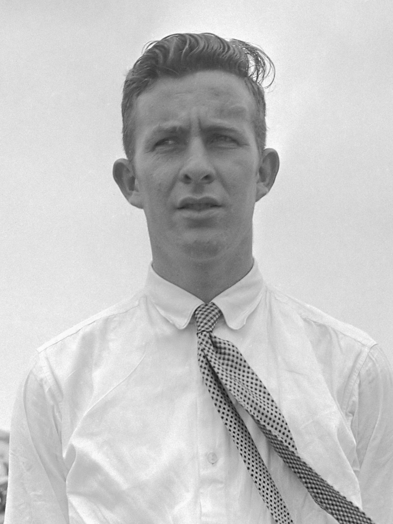 Nederlandse Wielrenners Tour de France . Van der Pluym 4 juli 1956